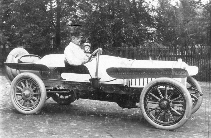 August Horch in Horch-PKW Scherl Bilderdienst Von der Prinz-Heinrich-Fahrt. August Horch, der bekannte Automobilfabrikant, auf seinem Wagen. [Stempel] D.S. 14.VI.08] ADN-ZB Der Autofabrikant August Horch mit seinem Wagen Aufn.: 1908 Abgebildete Personen: Horch, August Dr. Ing.: Automobilfabrikant, Deutschland (GND 118553577)